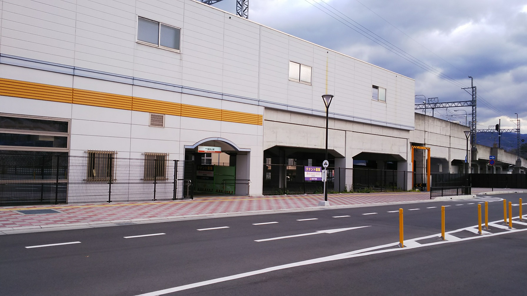 御幸辻駅西口全景